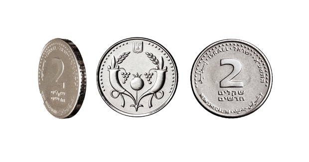 Израильские 2 новых шекеля 2010 года выпуска. Гурт, аверс и реверс.